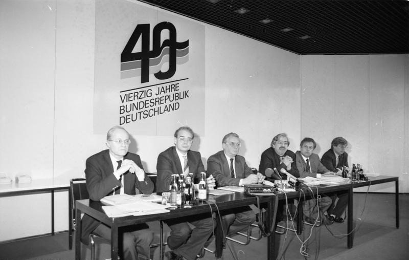 Am 16. Februar 1989 wurde die Ausstellung "40 Jahre Bundesrepublik Deutschland" vom Parlamentarischen Staatssekretär im Bundesinnenministerium, Horst Waffenschmidt im Bonner Wissenschaftszentrum eröffnet. Diese Wanderausstellung gehört zu den zentralen Veranstaltungen der 40-Jahr-Feier, neben dem Festakt der Verfassungsorgane im Mai und dem "Bürgerkrieg in Bonn mit Bundesfest".